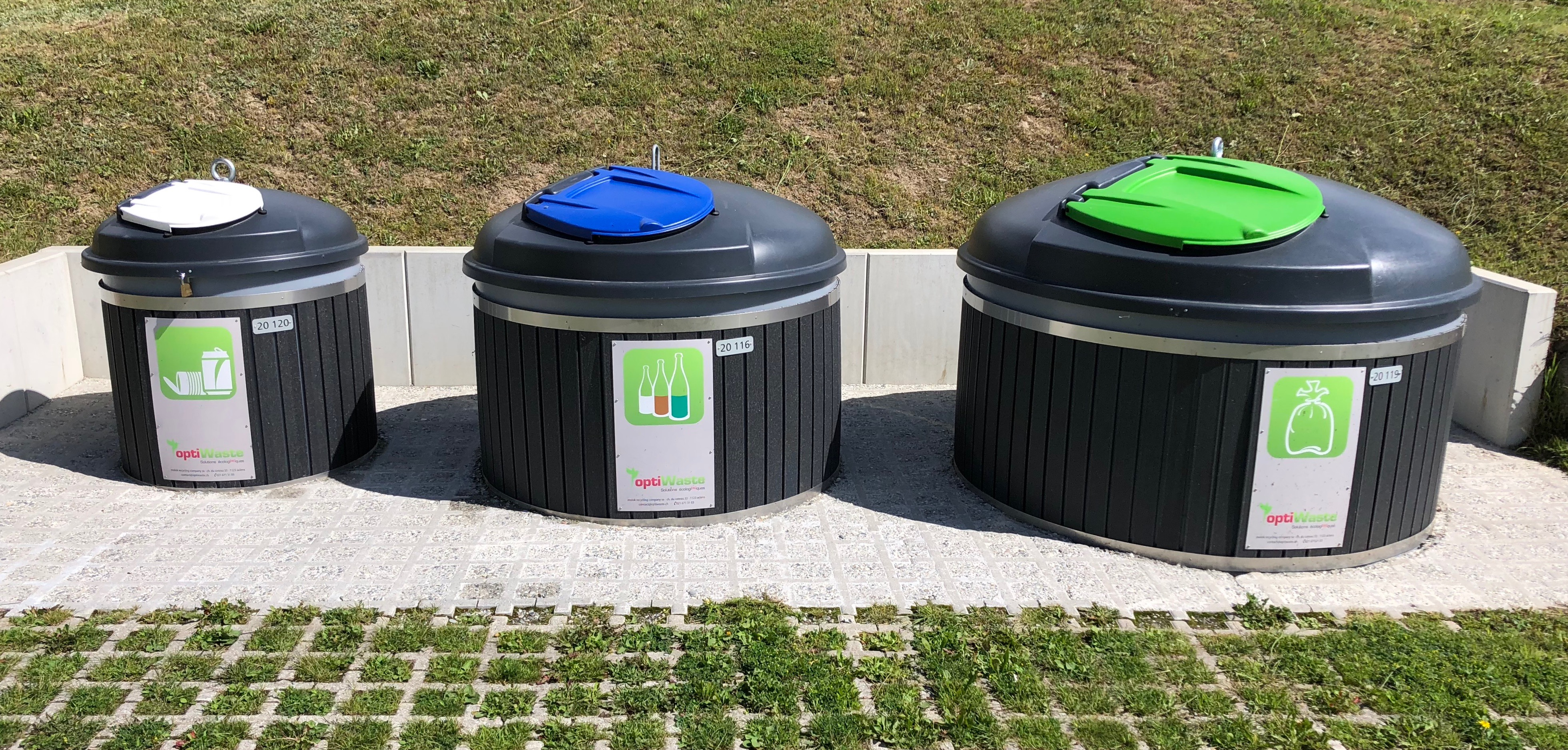 Halbunterflurcontainer MOLOK in der Schweiz